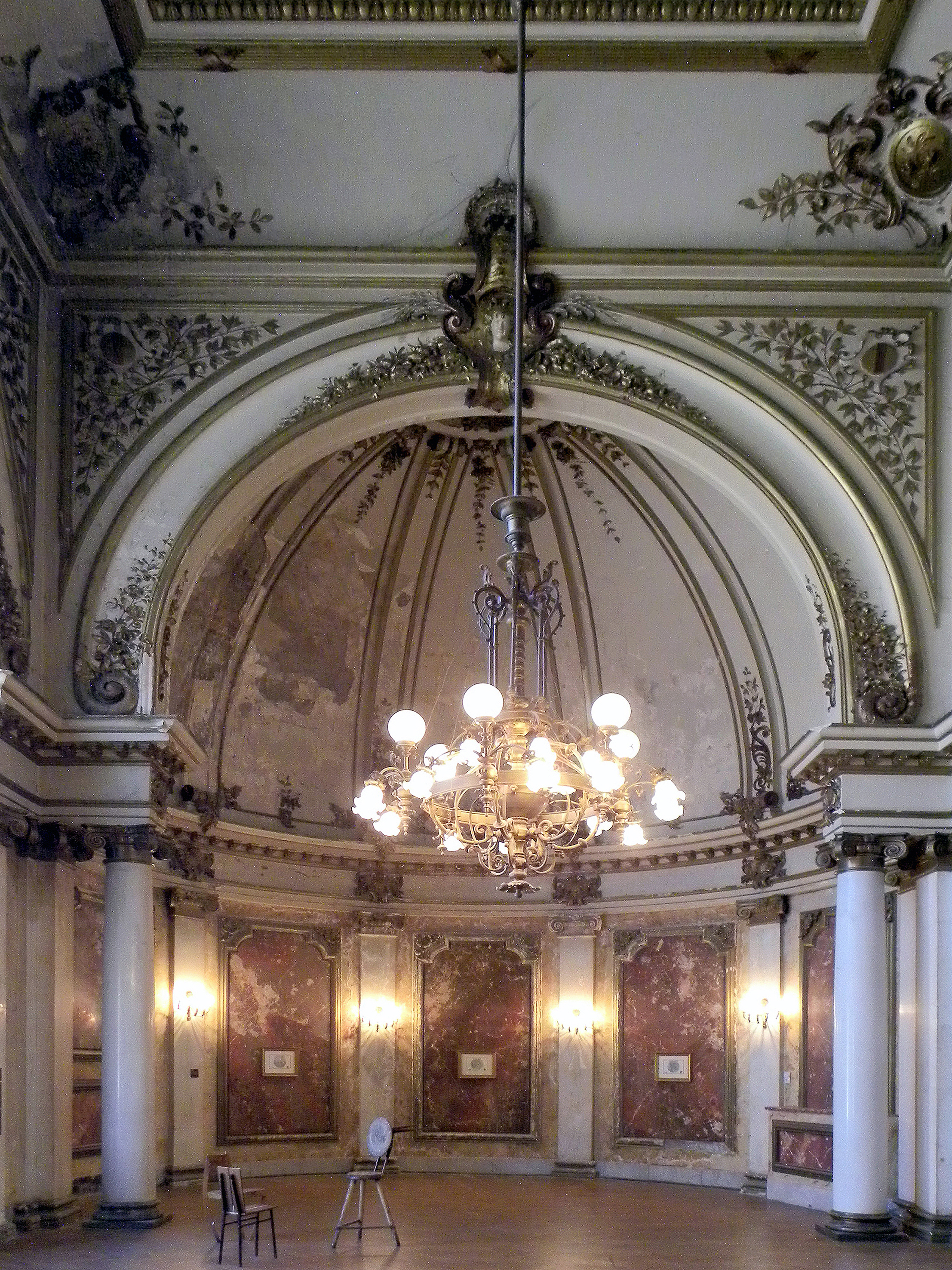 Beogradska zadruga Karadjorđeva 48 svečana sala